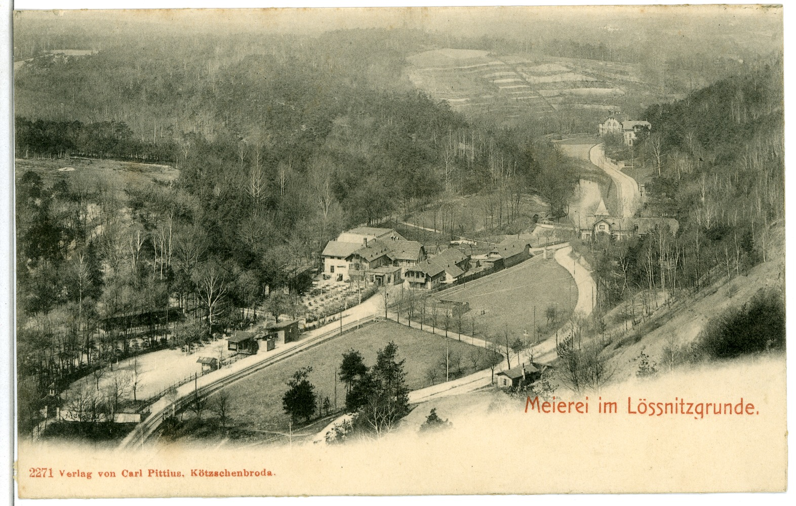 Niederlößnitz; Meierei im Lößnitzgrund This postcard is from publisher Brück & Sohn in Meißen ( postcard has a unique number 02271 and is available in a higher resolution at the publisher. This images was uploaded in a cooperation project between Wikipedians and the publisher.